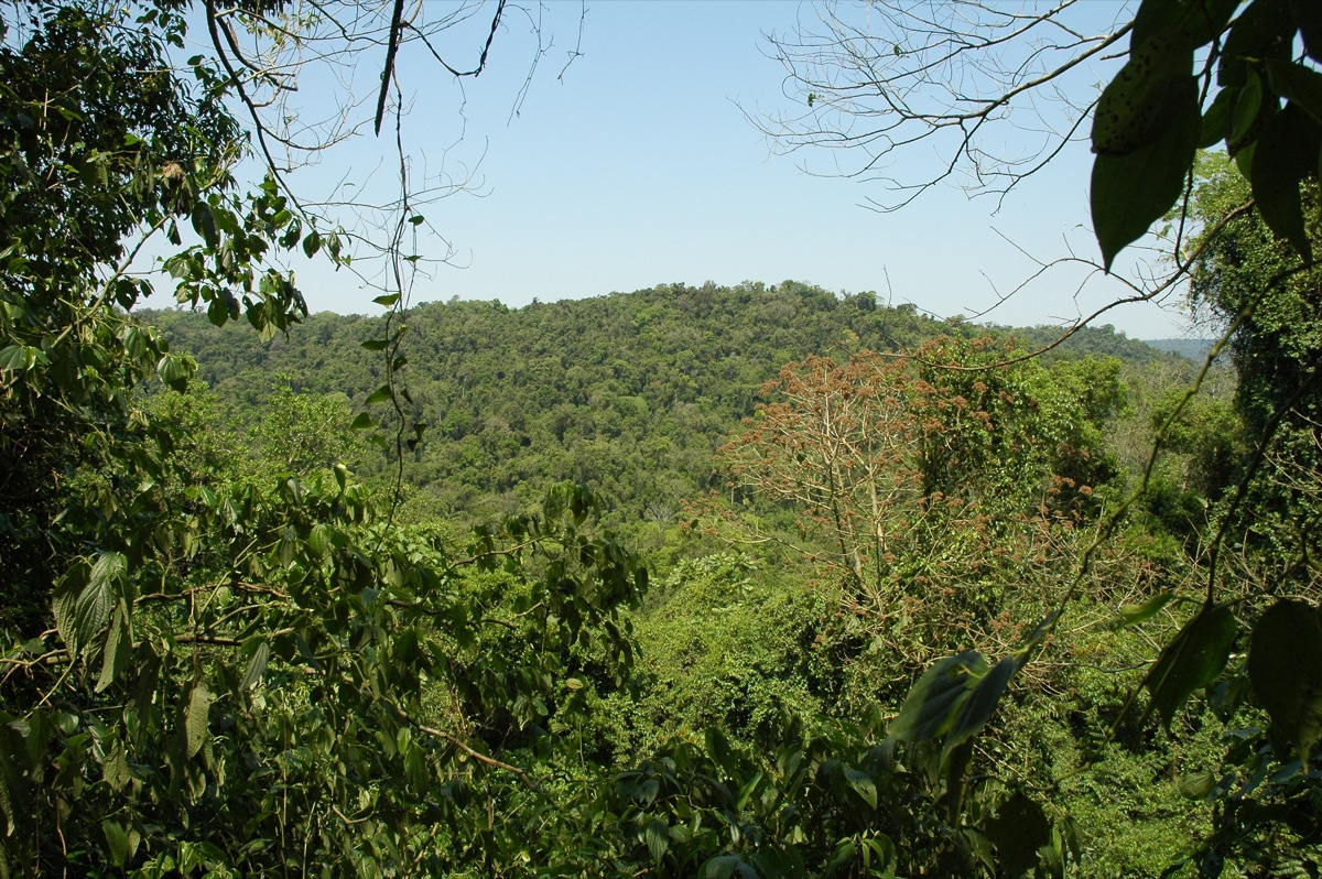 Vista da vegetação do Parque Estadual do Turvo.